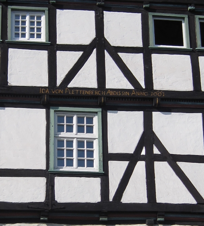 Äbtissinnengebäude, erbaut 1661 von der Äbtissin Ida von Plettenberg-Lenhausen. Kirchplatz 2 in Fröndenberg/Ruhr. This image shows a heritage building in Germany, located in the North Rhine-Westphalian city Fröndenberg/Ruhr (no. 33).